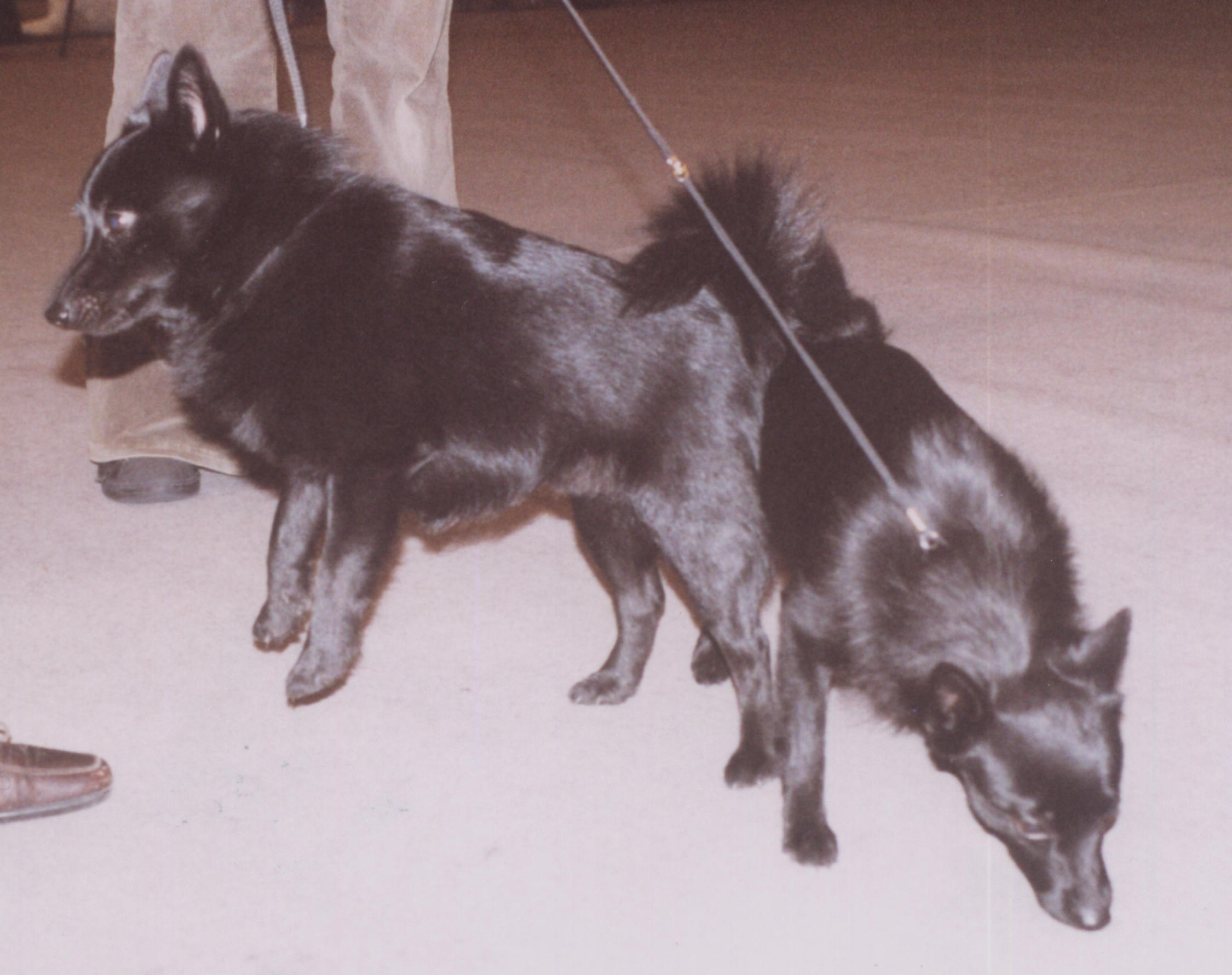 Schipperke